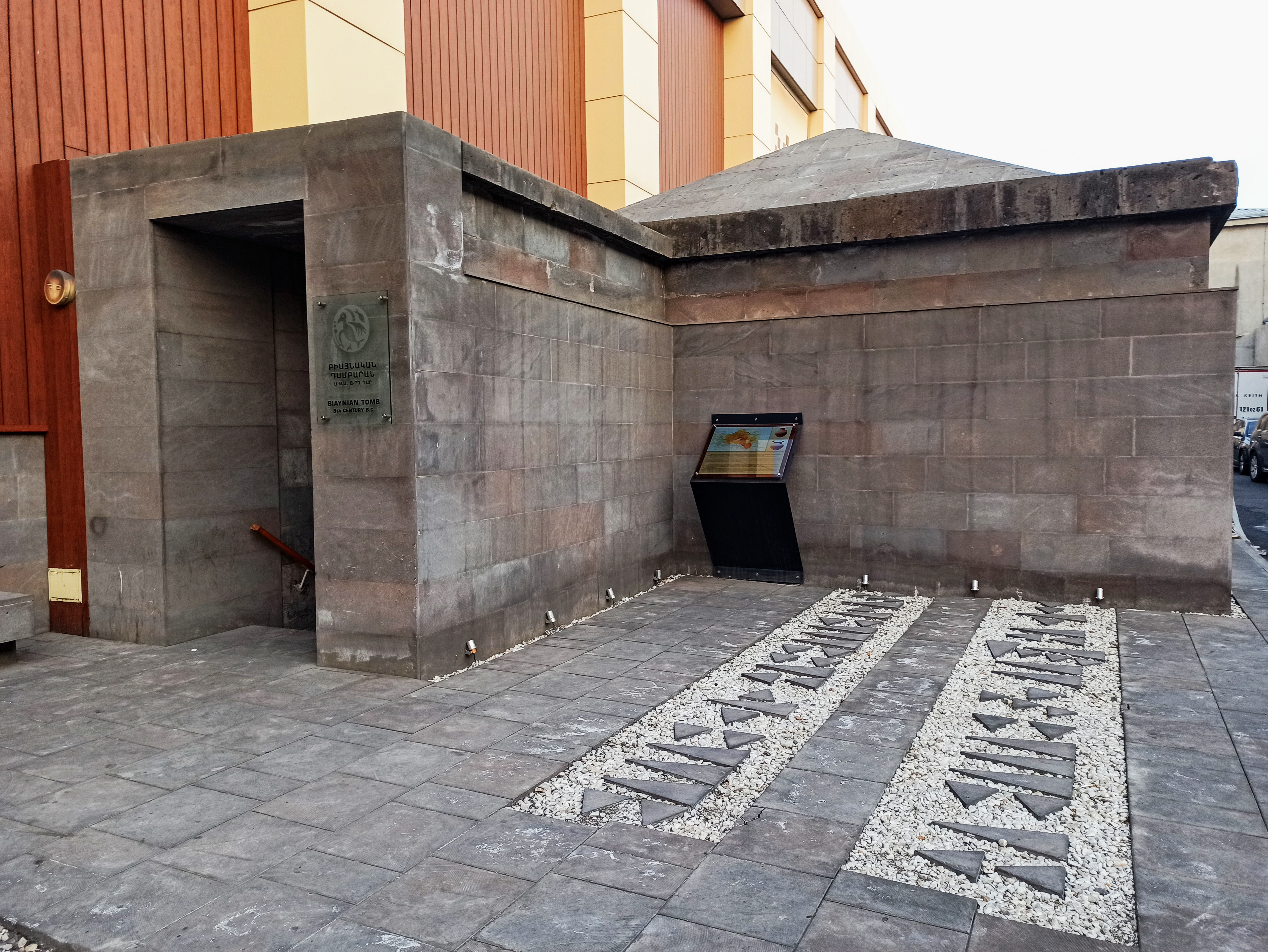 Բիայնական դամբարան, Երևան